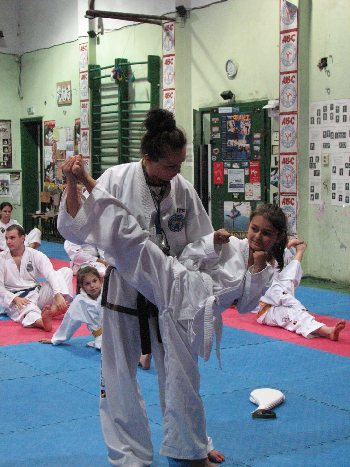 Недялка Бачева. Тренировка